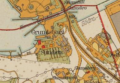 Sundsta på del av 1934 års karta över Stockholm med omgivningar.